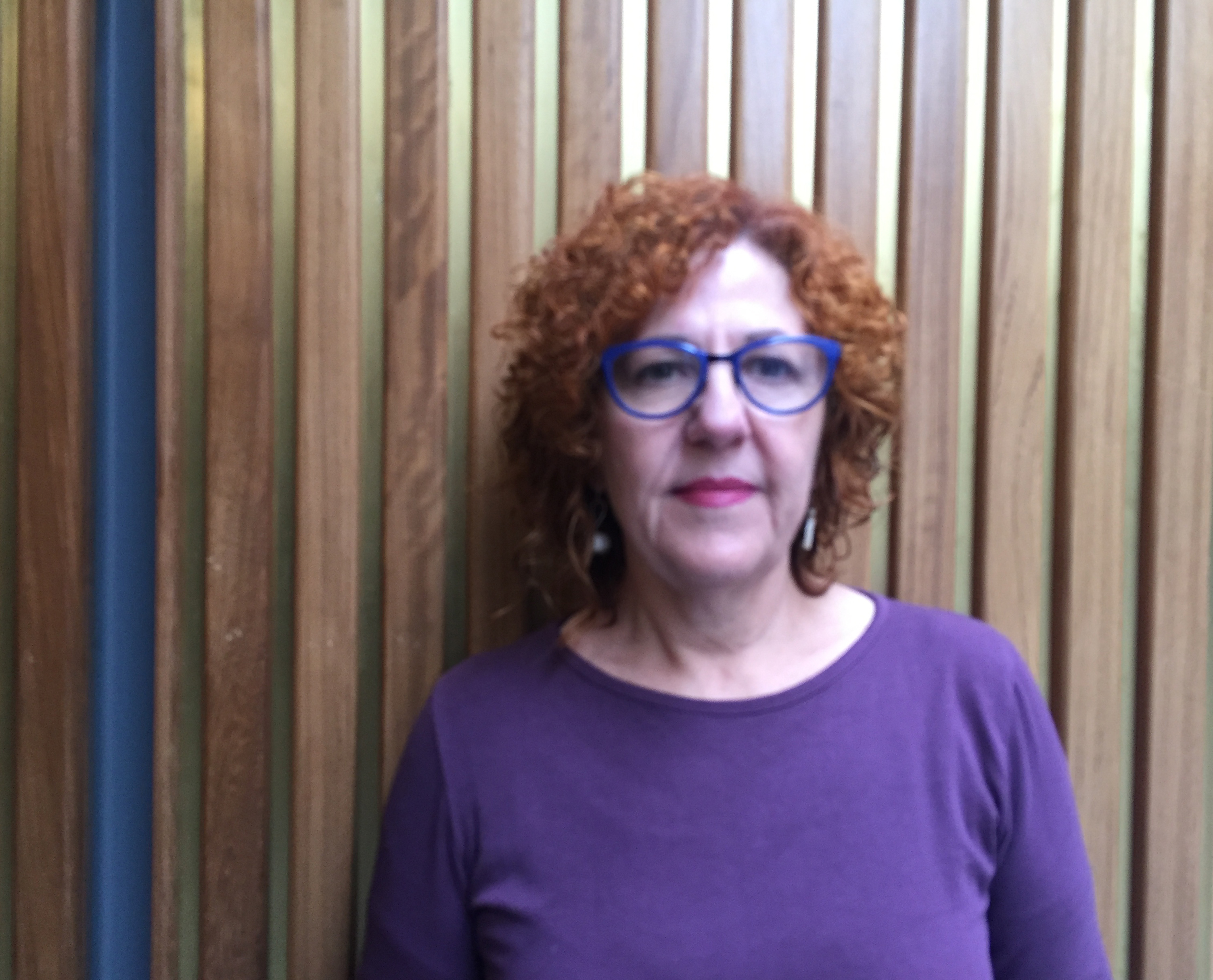 En asamblea MAV en Madrid 2018